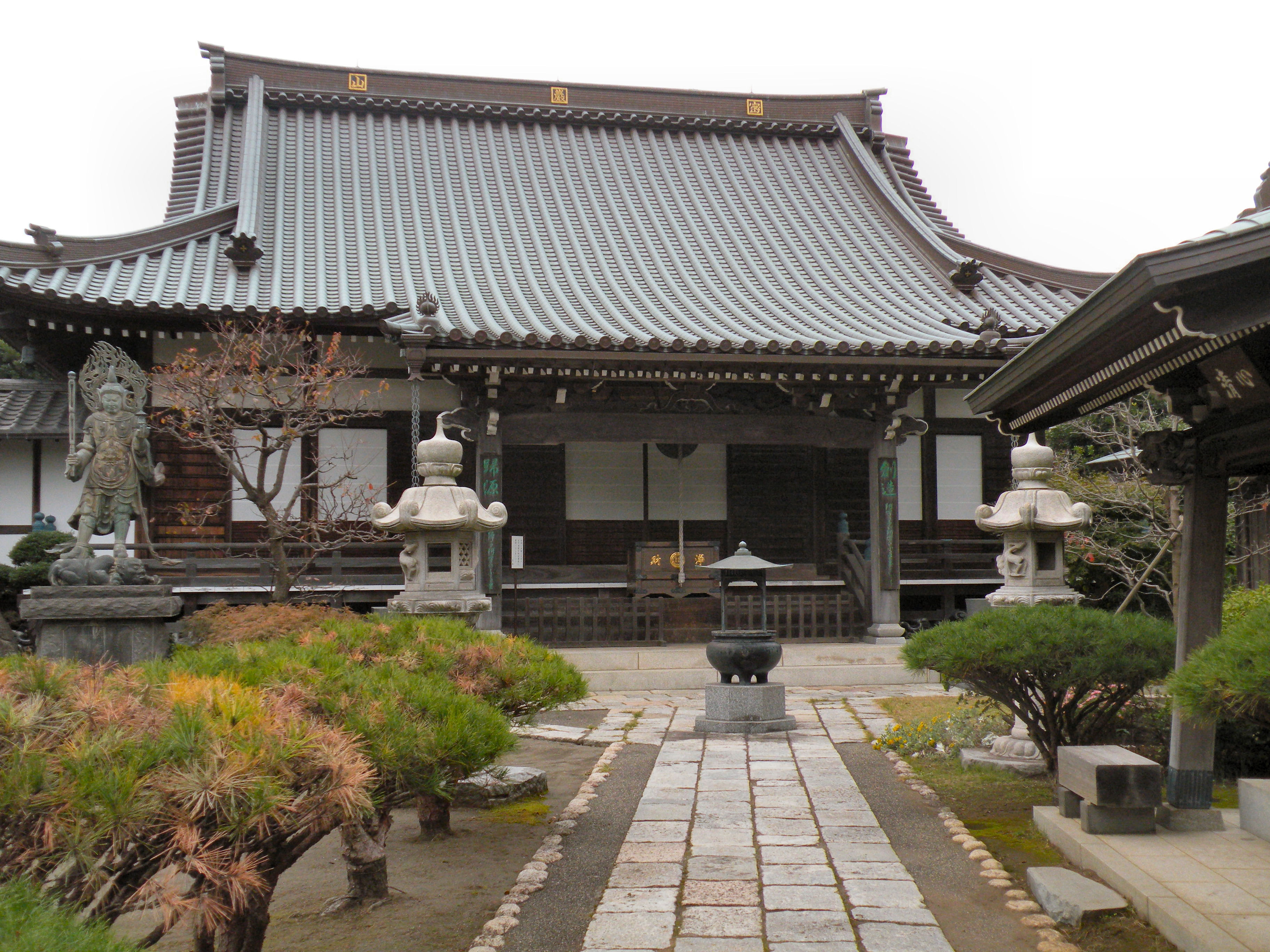 普門寺本堂